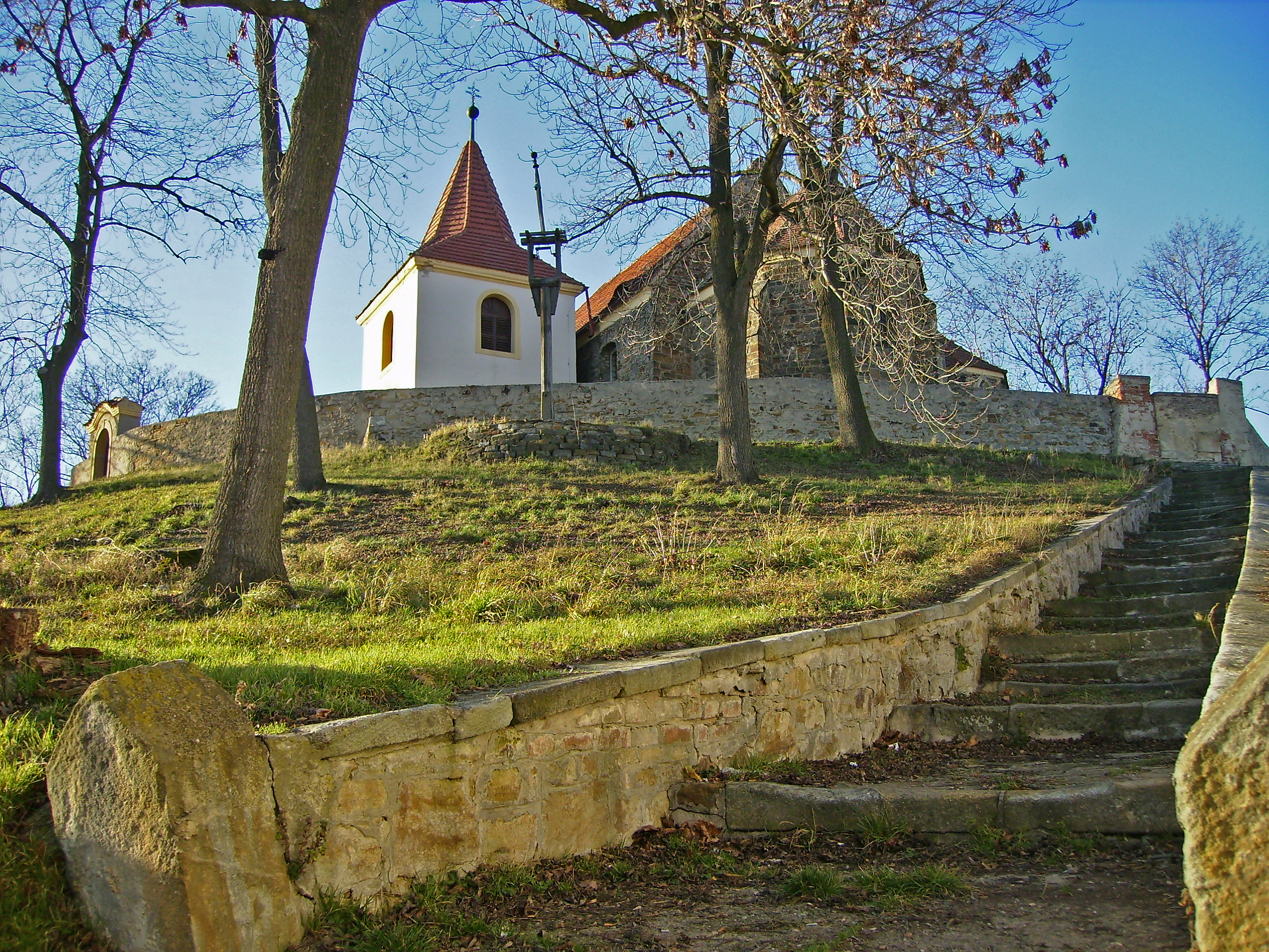 Kostel sv. Bartoloměje ve středočeském Mochově.